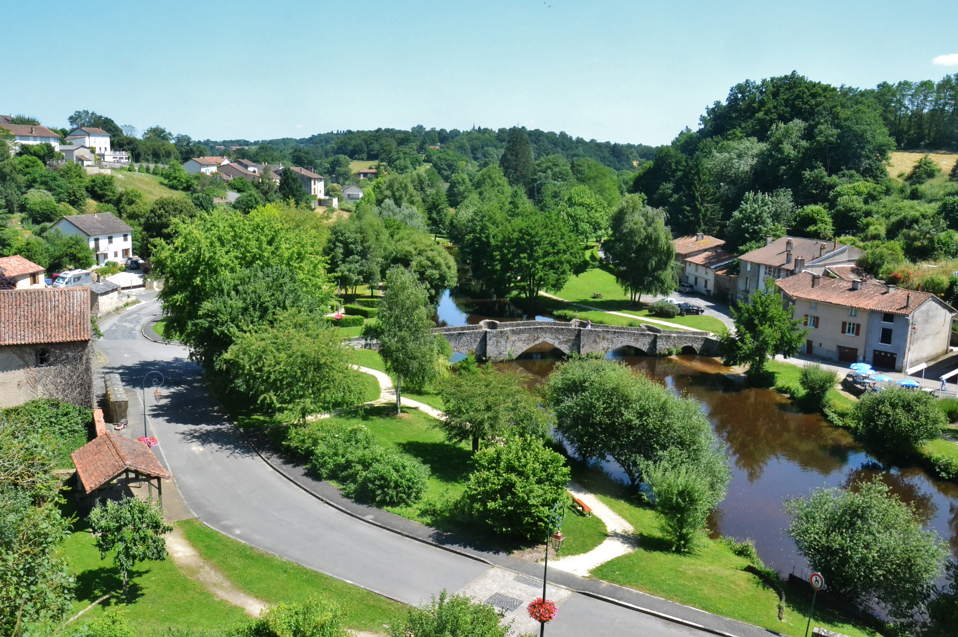 Les rives aménagées du Vincou et le pont de la Pierre à Bellac (Haute-Vienne, France)